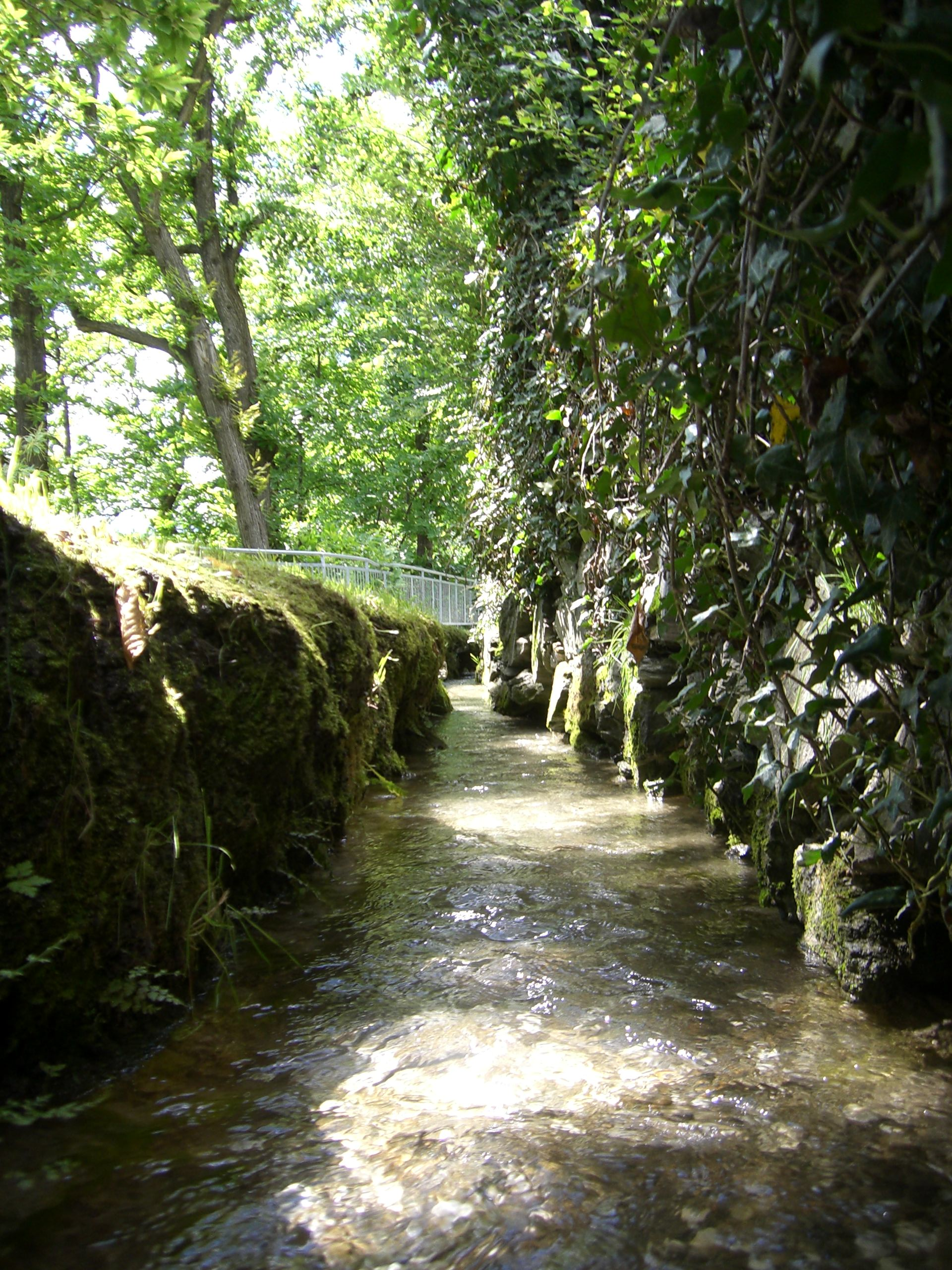 Waal in Schlanders